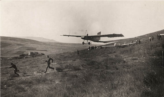 Планер А-5 К.К. Арцеулова в полёте, 1923 г. Узун-Сырт РГАНТД. Ф.348. Оп.3. Д.146. Л.6об.